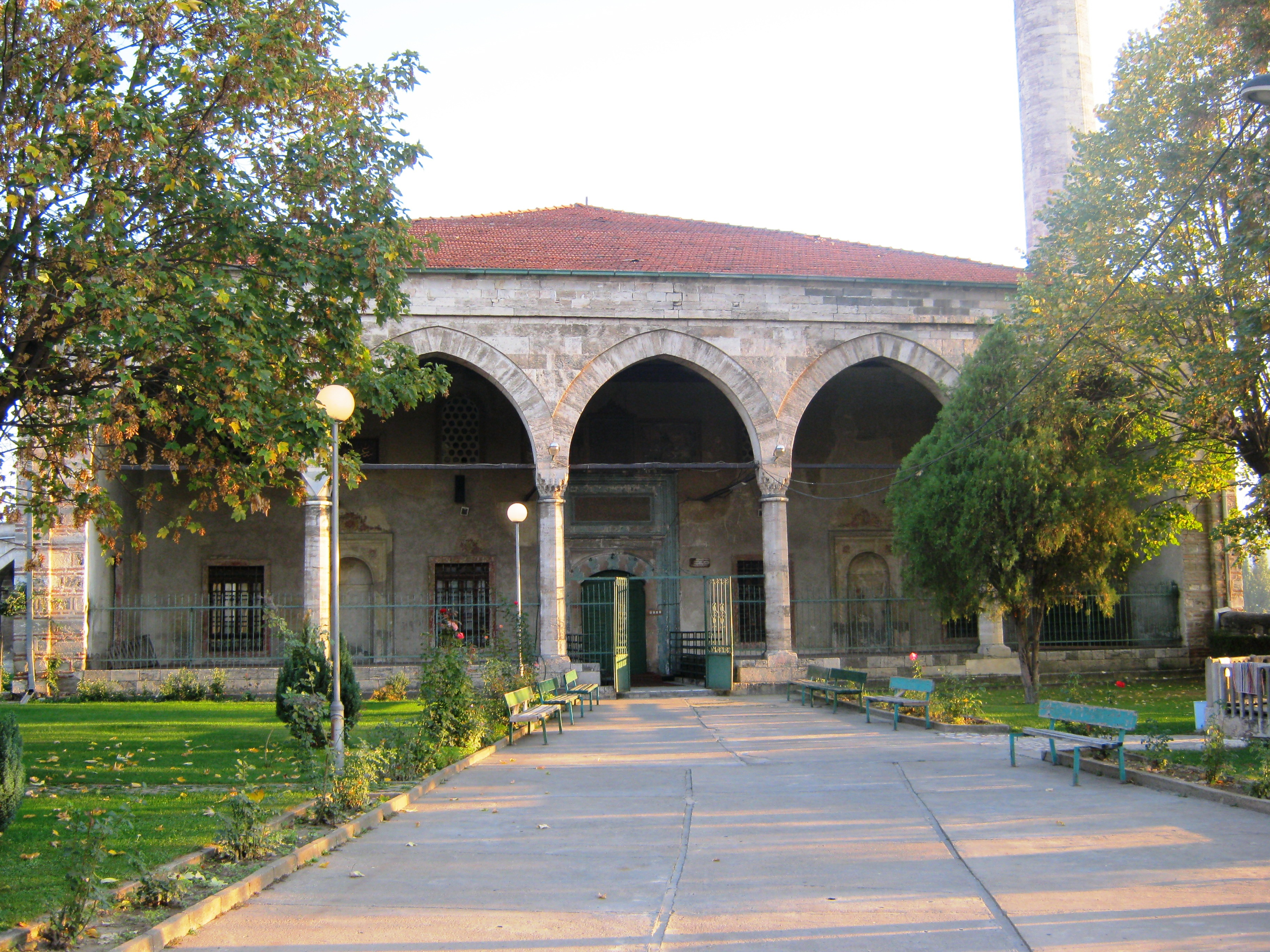 Поглед на Султан-муратовата џамија од нејзиниот двор